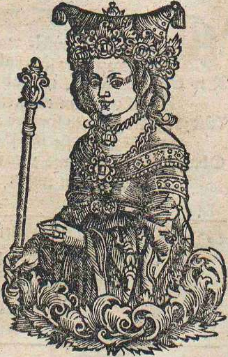 Wanda 9 Królowa Polski